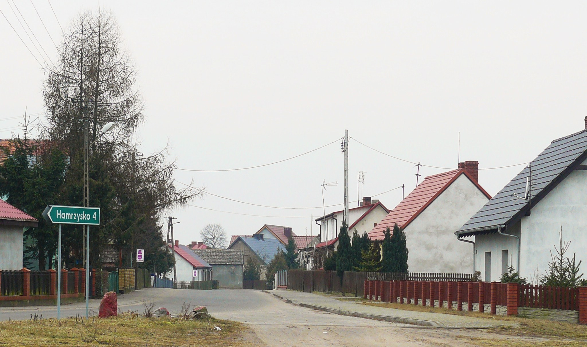 Biała w gm. Wieleń.